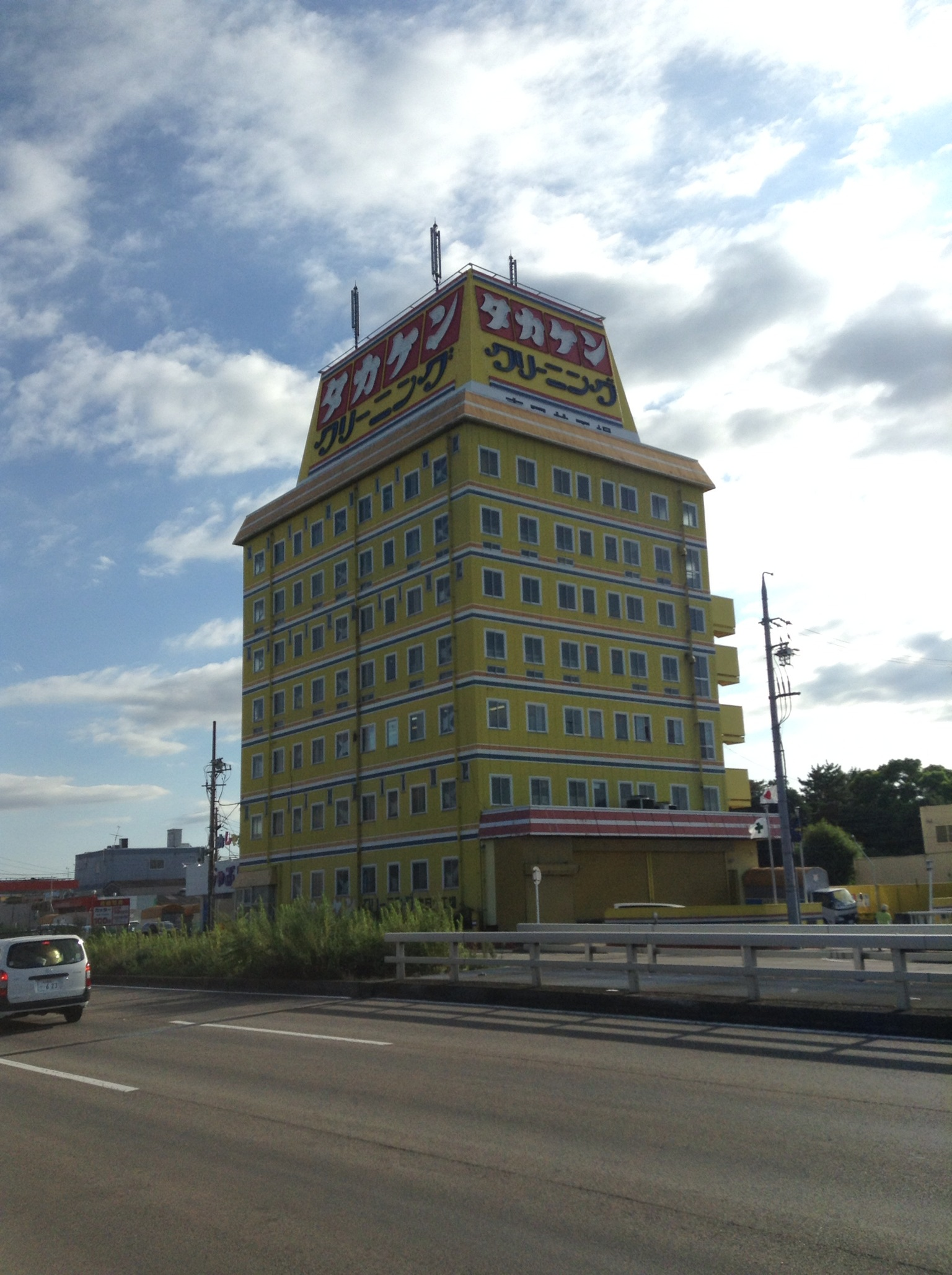 愛知県春日井市にあるタカケンクリーニング春日井工場